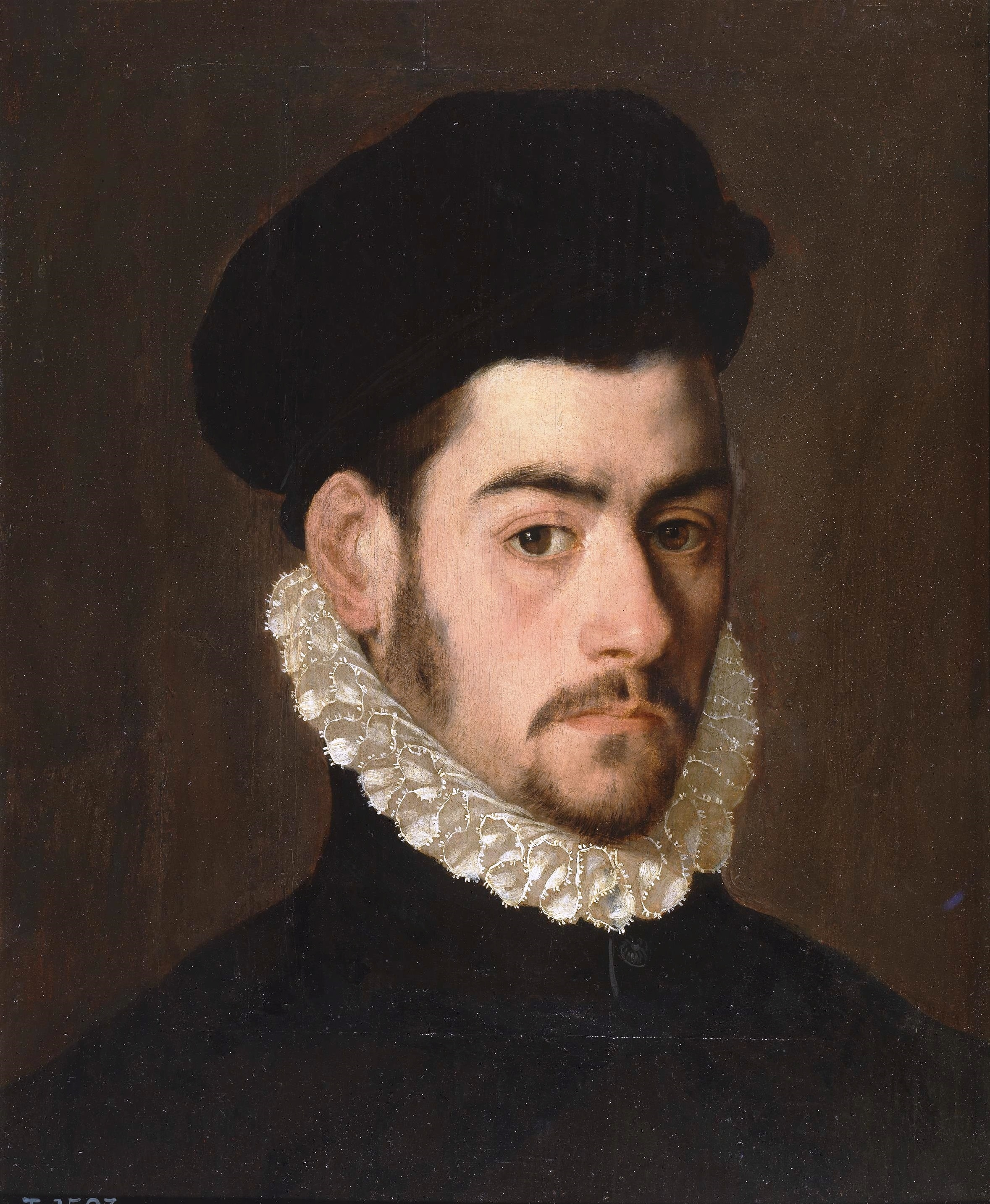 Posible autorretrato del pintor Alonso Sánchez Coello (1531-1588). Description El retrato representa a un hombre joven, vestido con traje negro y lechuguilla y con la cabeza cubierta por una oscura gorra. Como es habitual en los ejemplos del retrato civil del siglo XVI, la figura aparece de busto, destacándose sobre un fondo neutro. La técnica de ejecución es muy precisa, más prieta y descriptiva en el tratamiento del tejido blanco del cuello y algo más suelta y flexible en la pintura del rostro. Este presenta un gesto decidido, definido fundamentalmente por el firme rictus de la boca y la directa y franca mirada que el personaje dirige al espectador. La anchura de la lechuguilla y la altura trasera del cuello que se eleva hasta tocar las orejas permiten datar la obra en la década de los años setenta, periodo al que también corresponde el diseño de la gorra, de copa algo elevada. Estas precisiones cronológicas sobre la vestimenta del retratado están relacionadas con la identificación del personaje (Texto extractado de Antonio, T. de, en: El retrato español en el Prado. Del Greco a Goya, 2006, p. 50). Aunque no es seguro, se suele considerar esta obra un autorretrato de Sánchez Coello discípulo de Antonio Moro y primer retratista de corte de Felipe II.